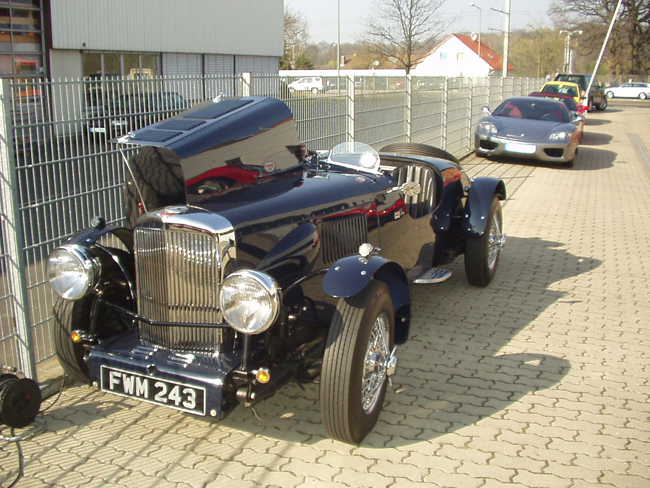 ALVIS TA14 (1948)